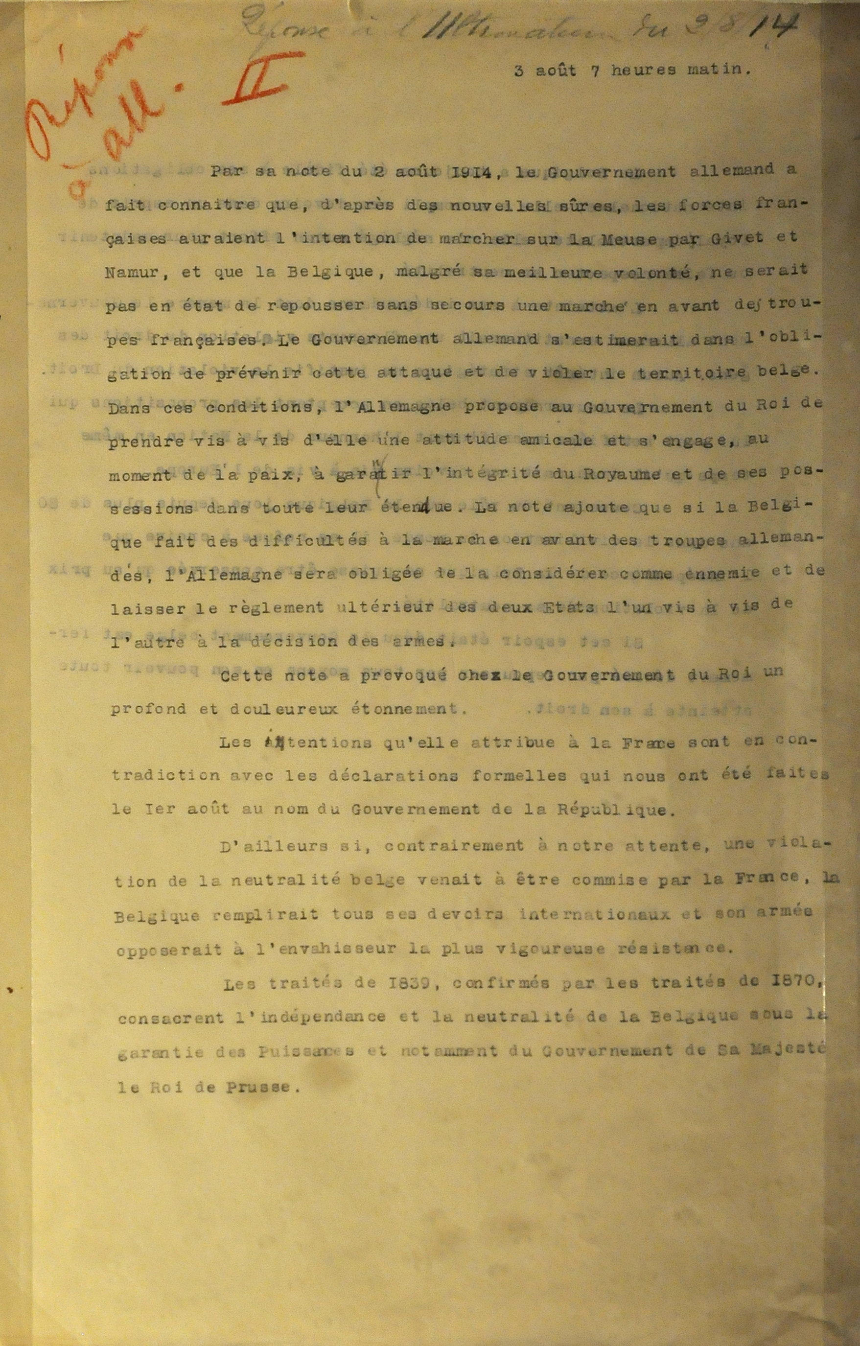 Voorbereiding Belgisch antwoord op Duits ultimatum van 3 augustus 1914 - Koninklijk Museum van het Leger en de Krijgsgeschiedenis Brussel This photo of movable heritage has been taken in the Brussels Capital Region